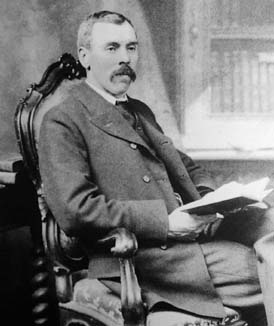 Photo du mathématicien britannique Henry Frederick Baker (1866– 1956).